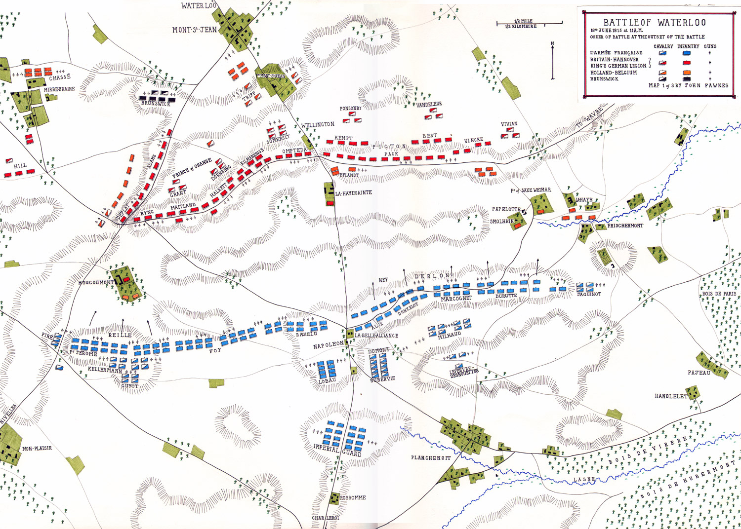 map of the battle of waterloo, positions